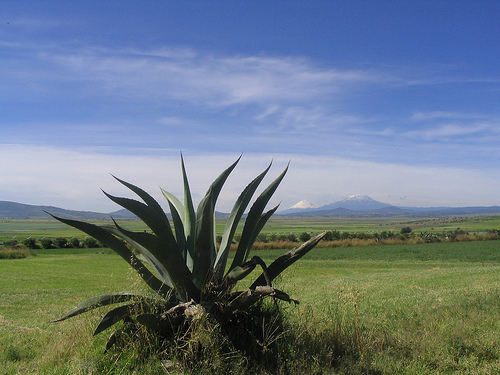 Llanos de Apan, al fondo los volcanes de Popocatépetl e Iztaccíhuatl (Mujer Dormida).